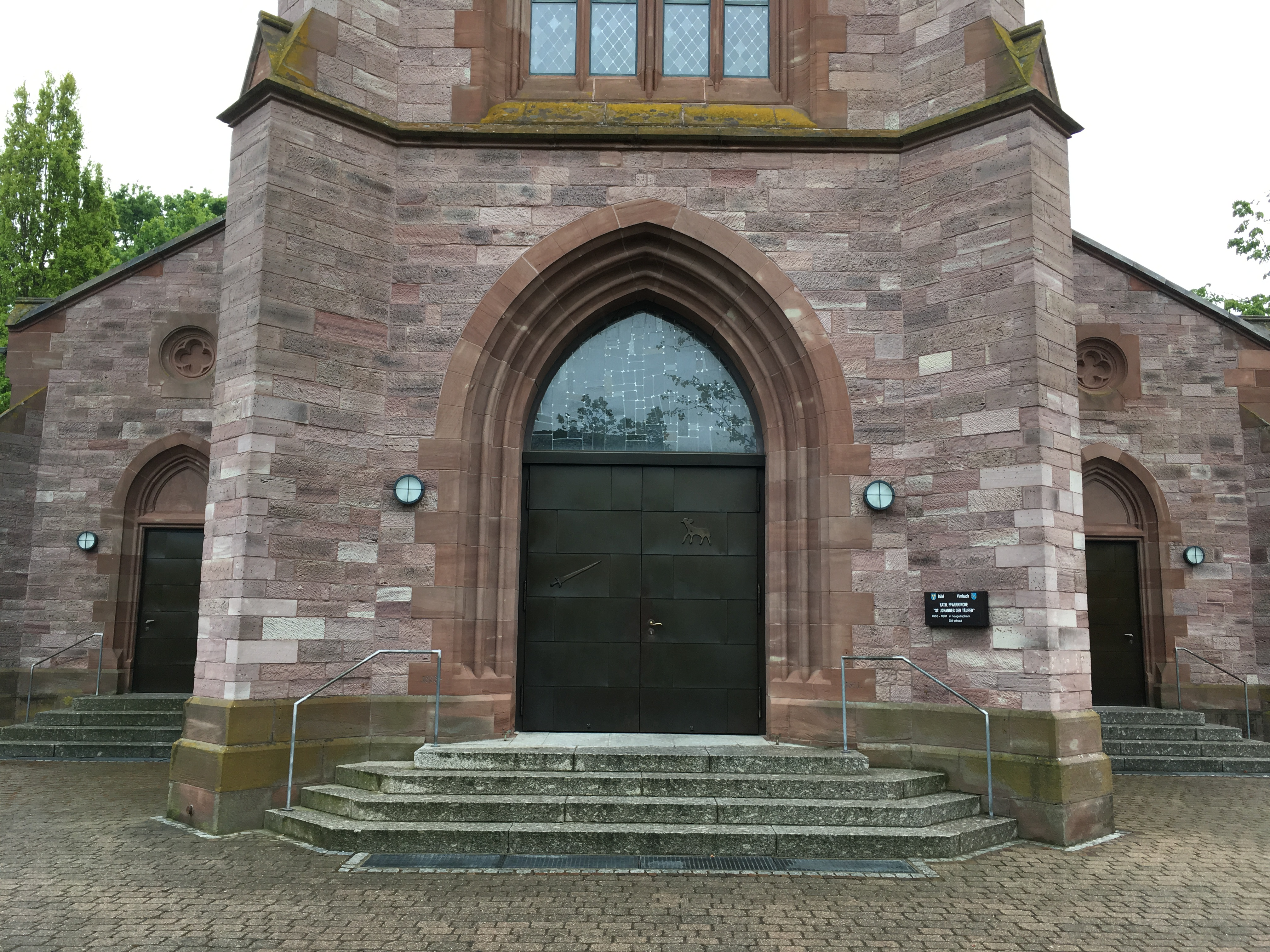 Die Pfarrkirche St. Johannes im Vimbuch ist eine neugotische, römisch-katholische Kirche in Bühl in Baden-Württemberg. Sie entstand in den Jahren 1888 bis 1891. In ihrem Innern steht unter anderem ein Altarretabel des elsässischen Bildhauers Niklaus von Hagenau aus dem Jahr 1508.